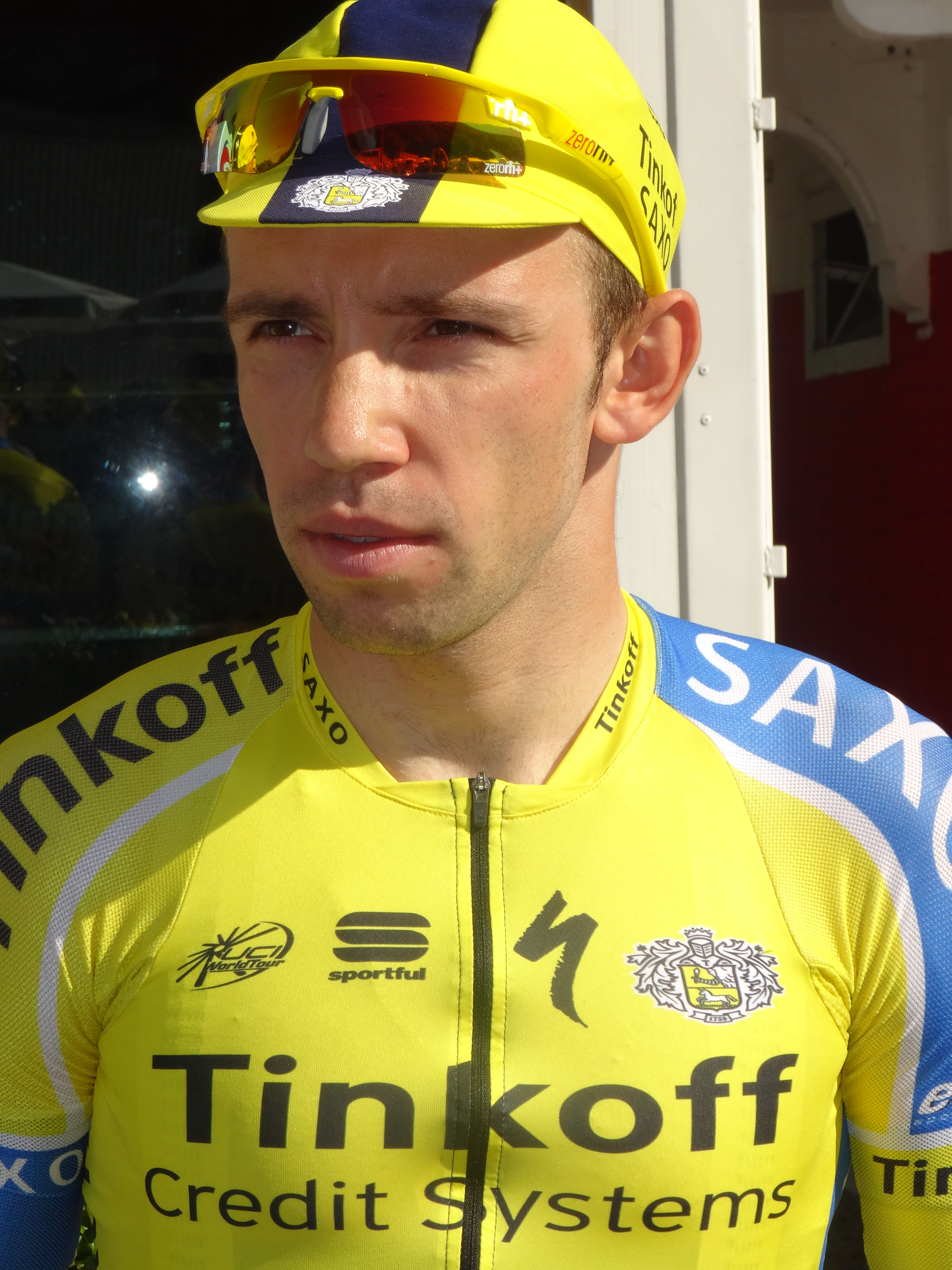 Reportage photographique réalisé le mercredi 17 septembre à l'occasion du départ du Grand Prix de Wallonie 2014 à Chaudfontaine, Belgique.